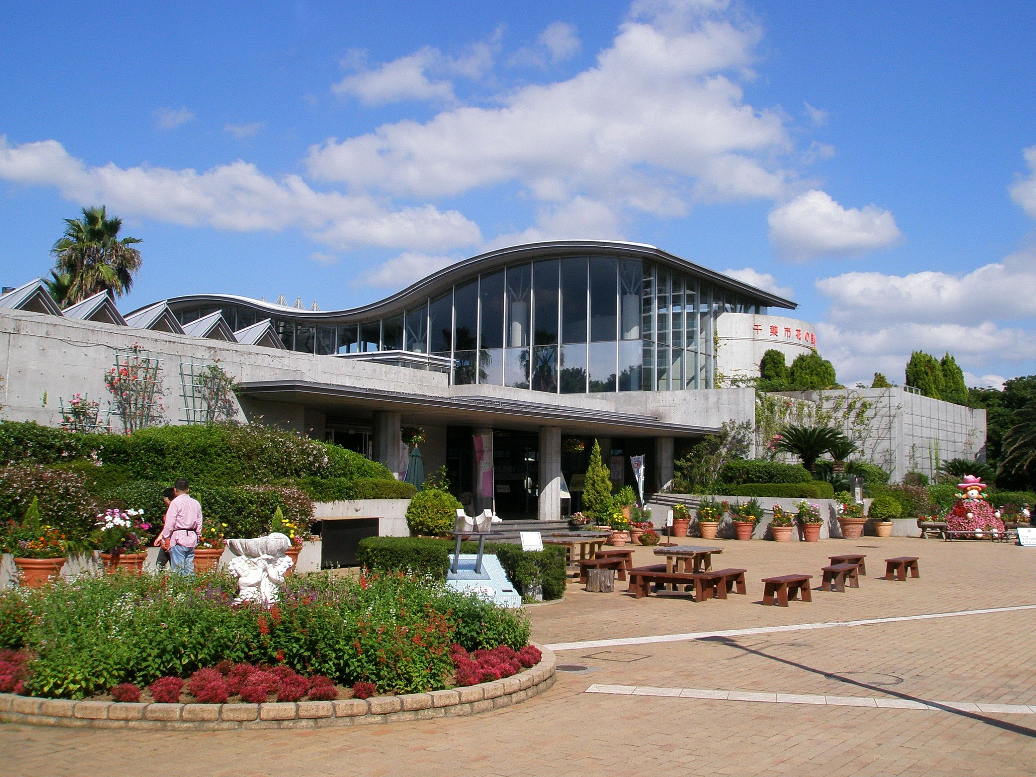 稲毛海浜公園内、千葉市花の美術館